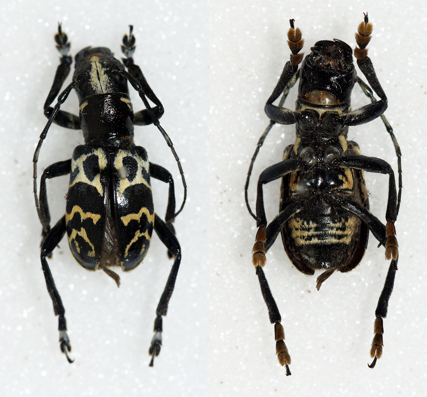 Schultze,1934 Sex: Male Data: 11-2014 - Kayapa - Nueva viscaya -Northern Luzon - Philippines Size: 13mm